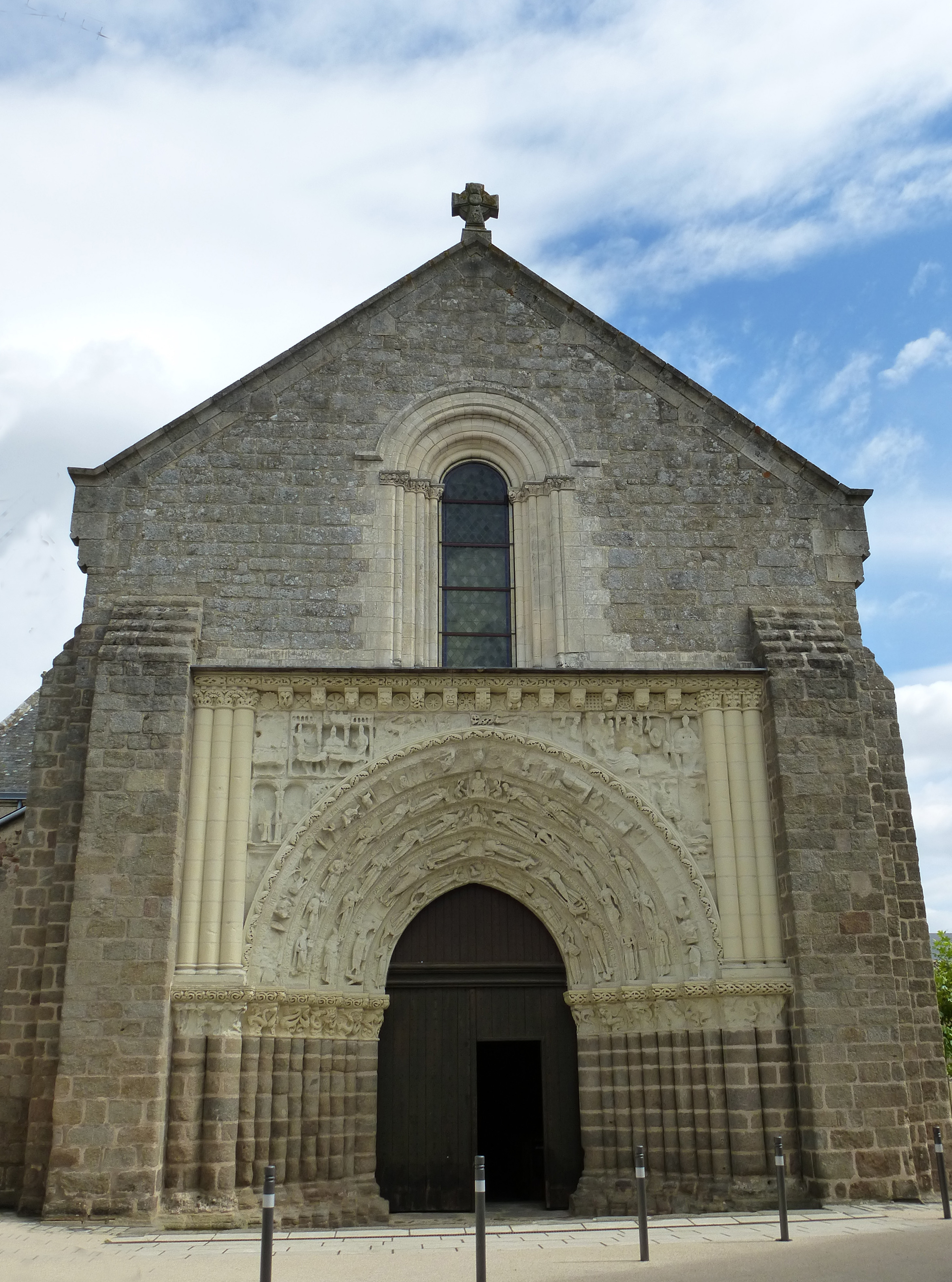 Eglise romane